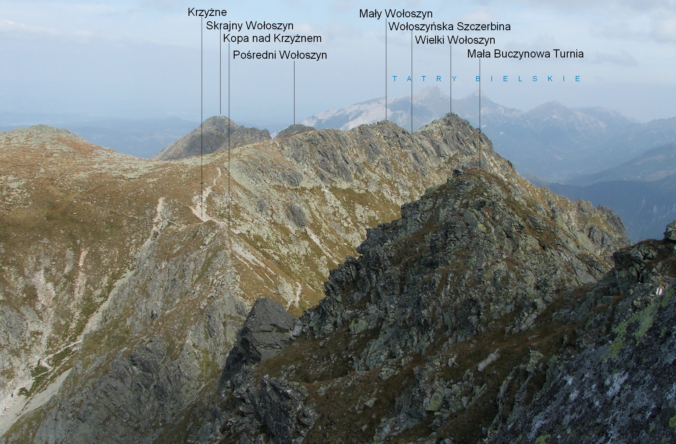 Widok ze szlaku Orlej Perci na Małej Buczynowej Turni